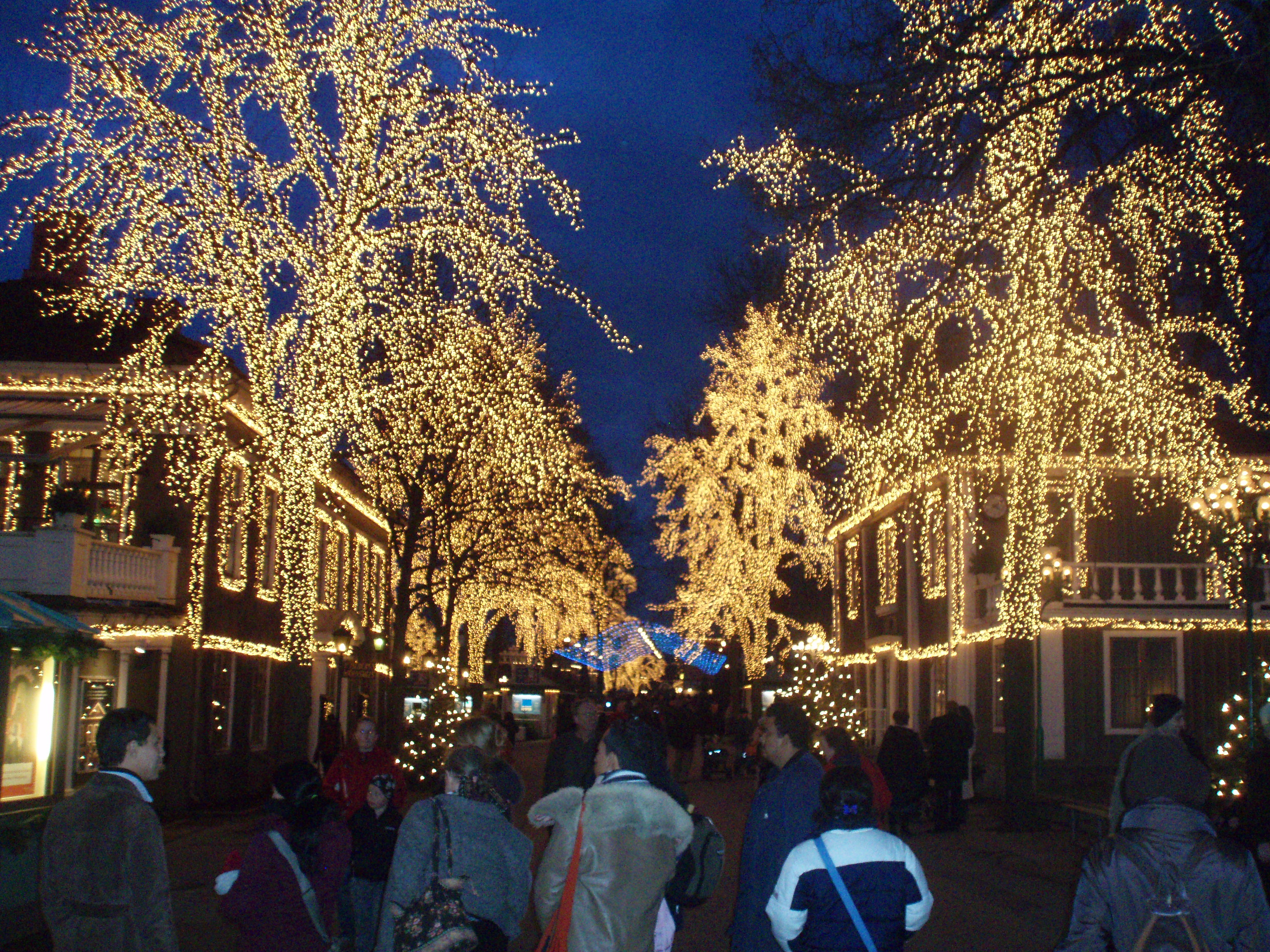 Jul på Liseberg i november 2006.